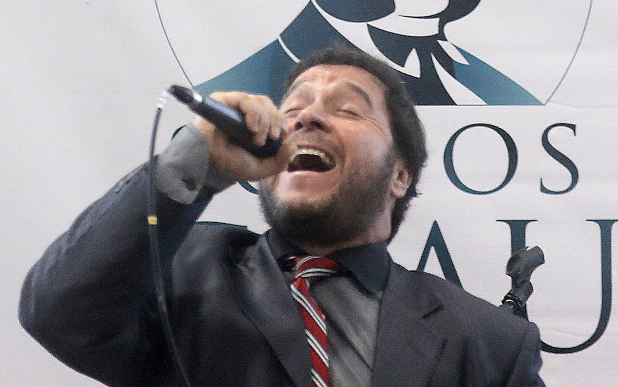 El ministro de Defensa, Pedro Cateriano, participó en la entrega del III Premio Nacional “Almirante Miguel Grau”, otorgado a personas e instituciones que practican y difunden los valores cívicos y patrióticos del Peruano del Milenio.